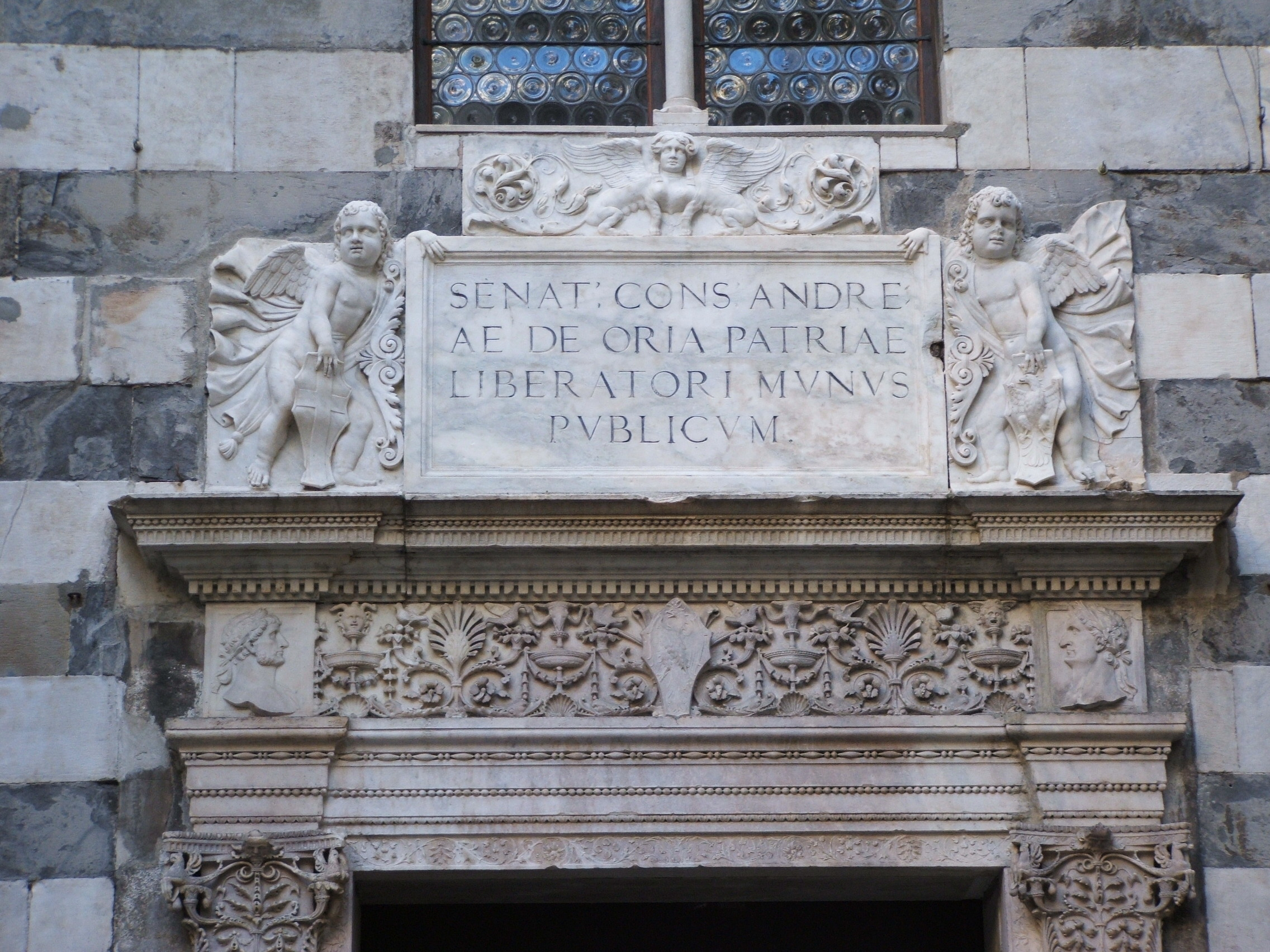 Immagine da Genova